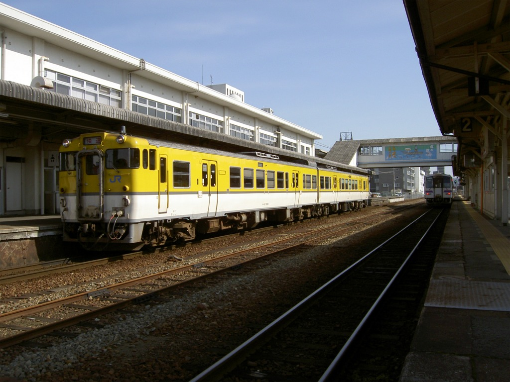 三次駅1･2番線